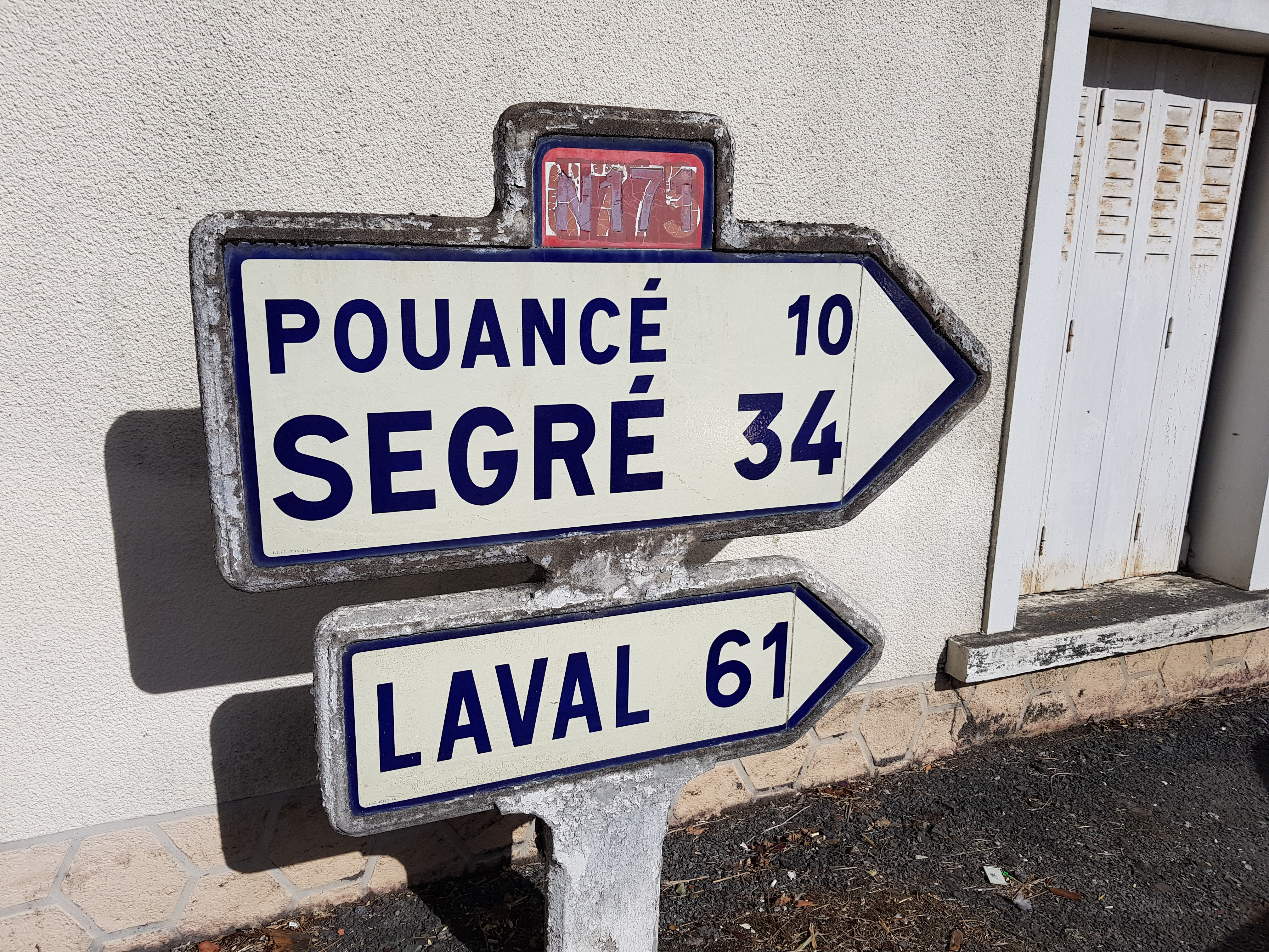 Panneau Michelin à Soudan (44).